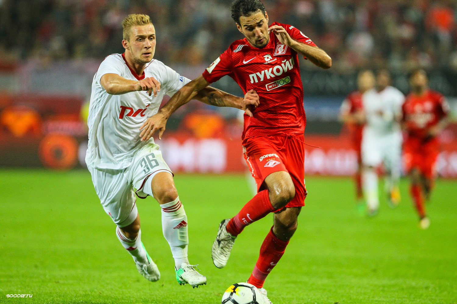 Суперкубок России по футболу 2017 года